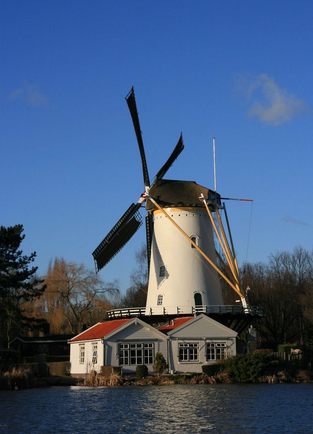 Rotterdam-Terbregge, windmolen De Vier Winden, gezien vanaf de overzijde van de Rotte